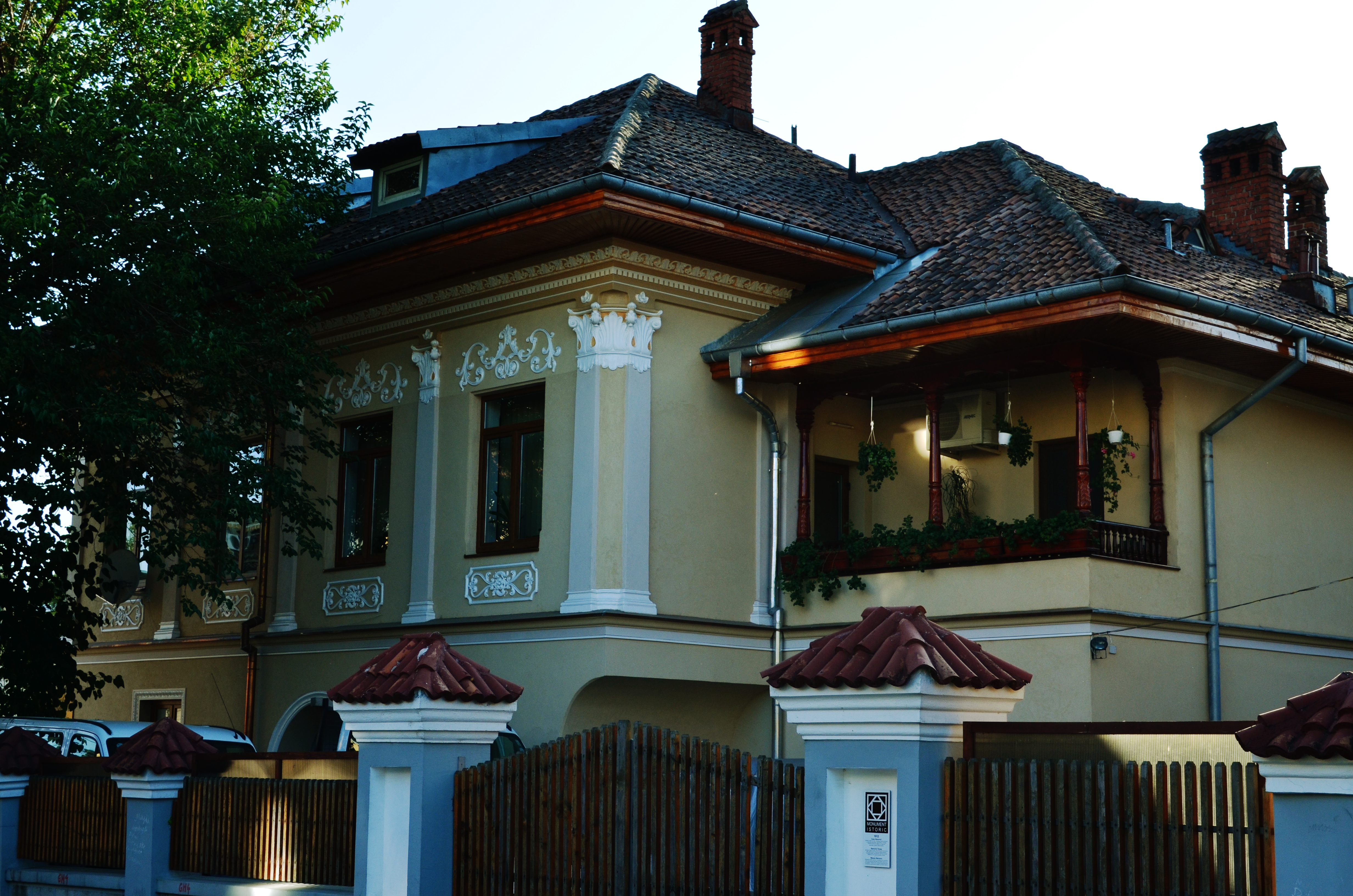 Casa Stanovici, Strada Remus nr. 6, București